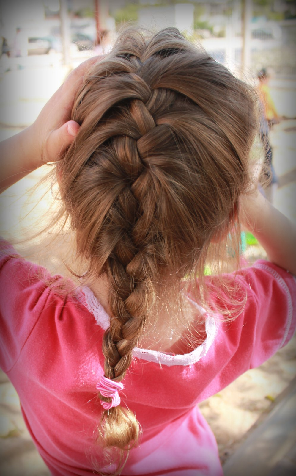 Tzama sinit